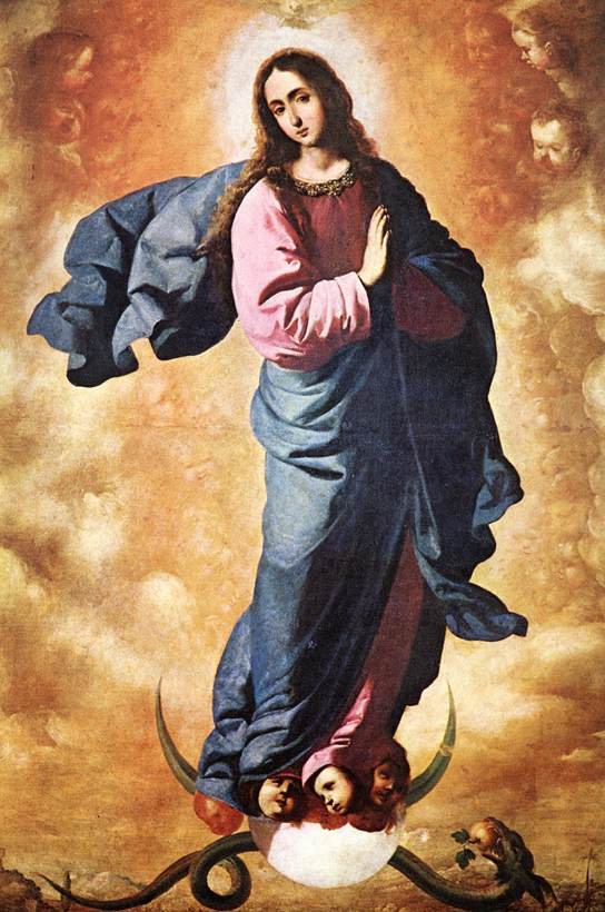 La obra representa la Inmaculada Concepción de la Virgen María, madre de Jesucristo.